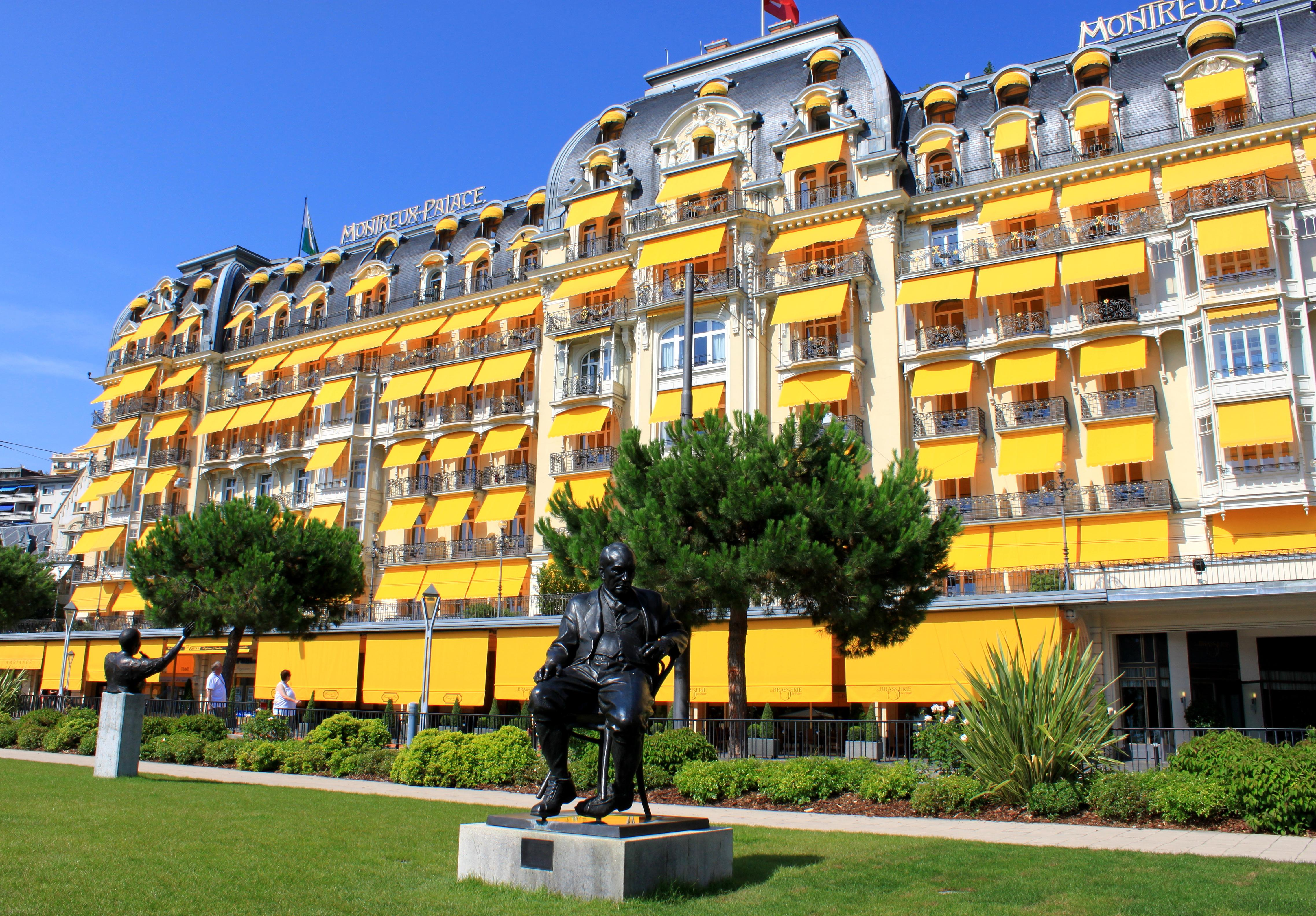 Suisse, canton de Vaud, Montreux, Palace-Hôtel.